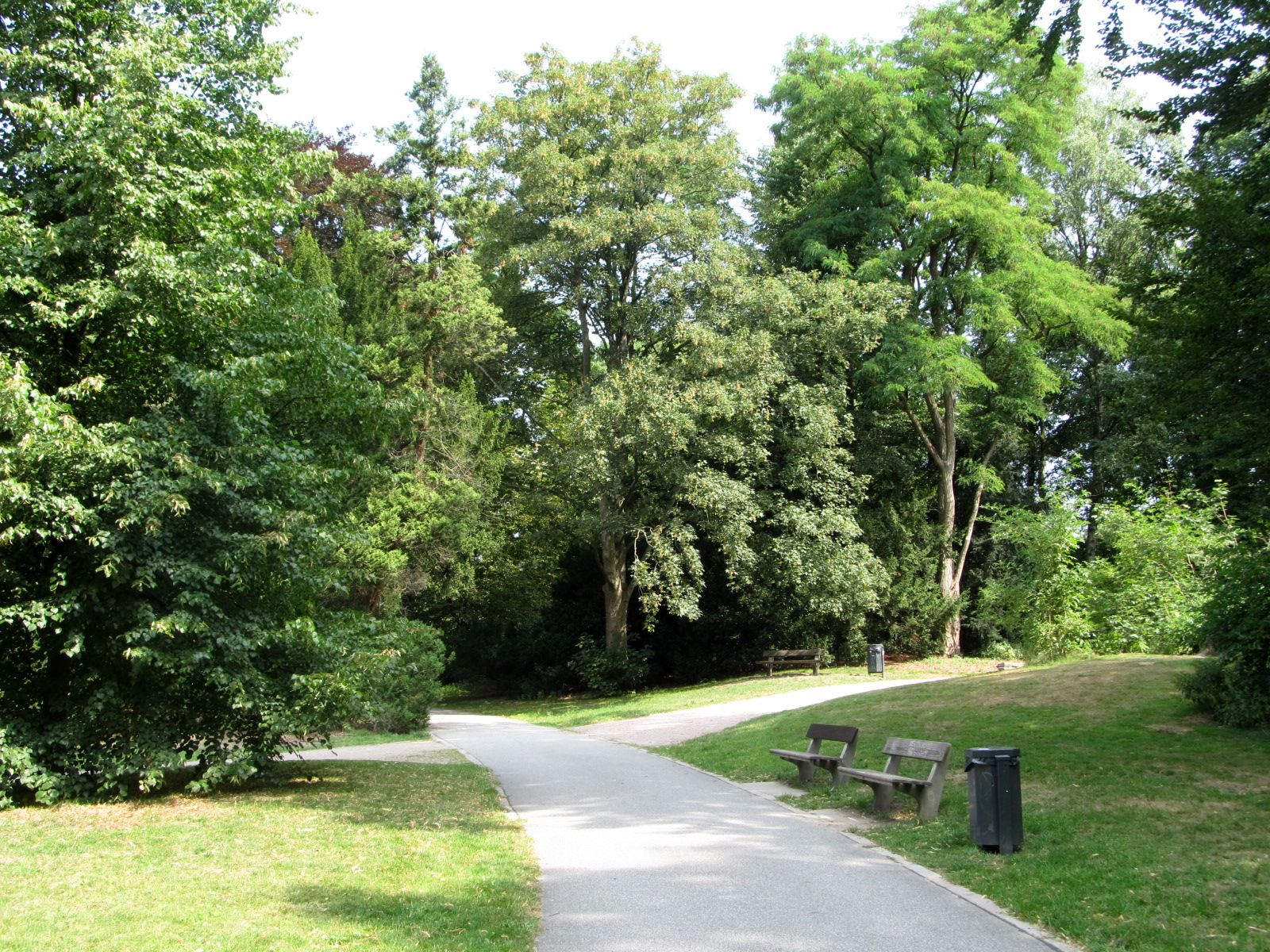 Friedrichsberger Park in Hamburg: Partie im ehemaligen Krankenhauspark